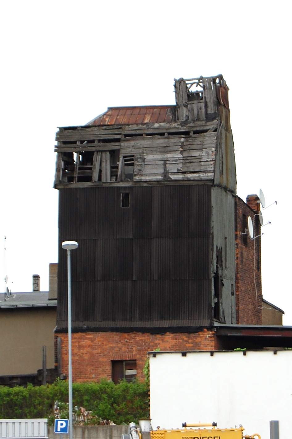 Reste einer Windmühle in Magdeburg-Fermersleben, Reichwein/ Ecke Comeniusstraße